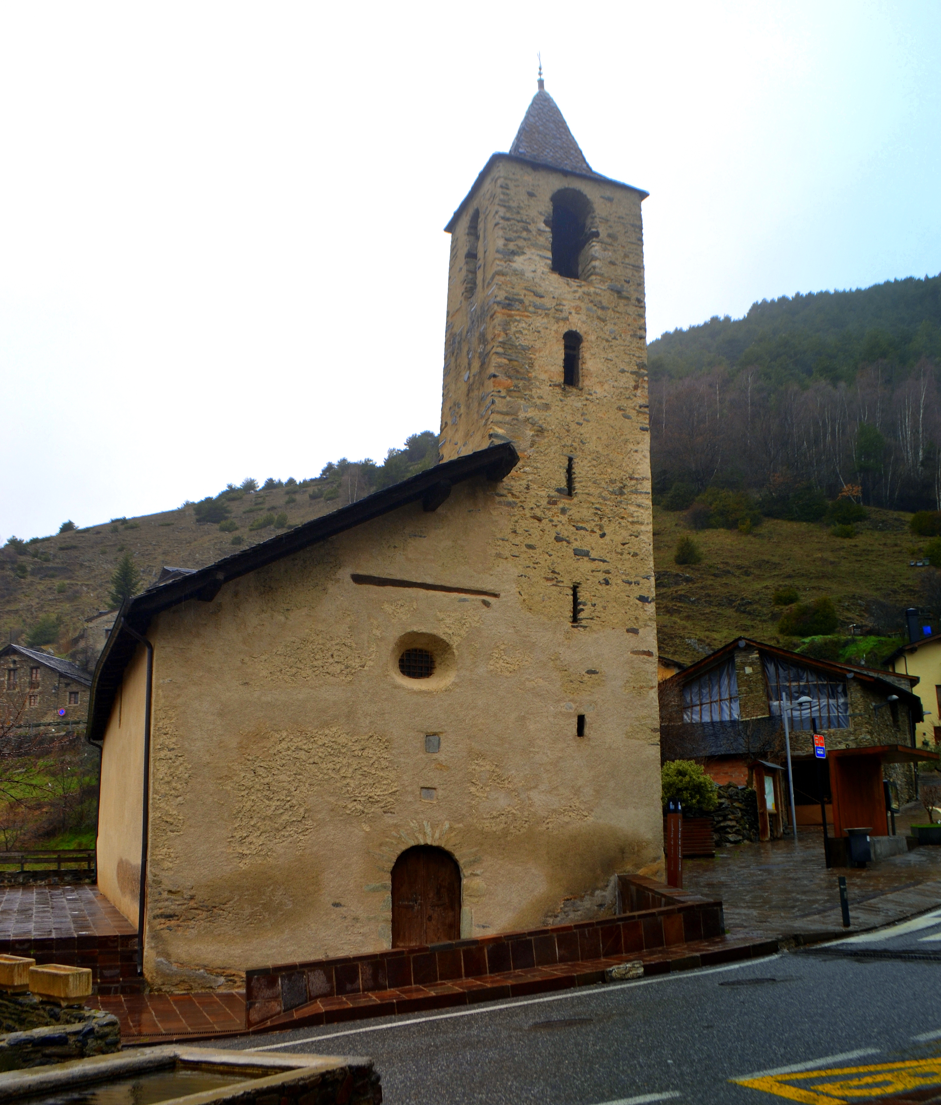 Església de Sant Joan de Sispony